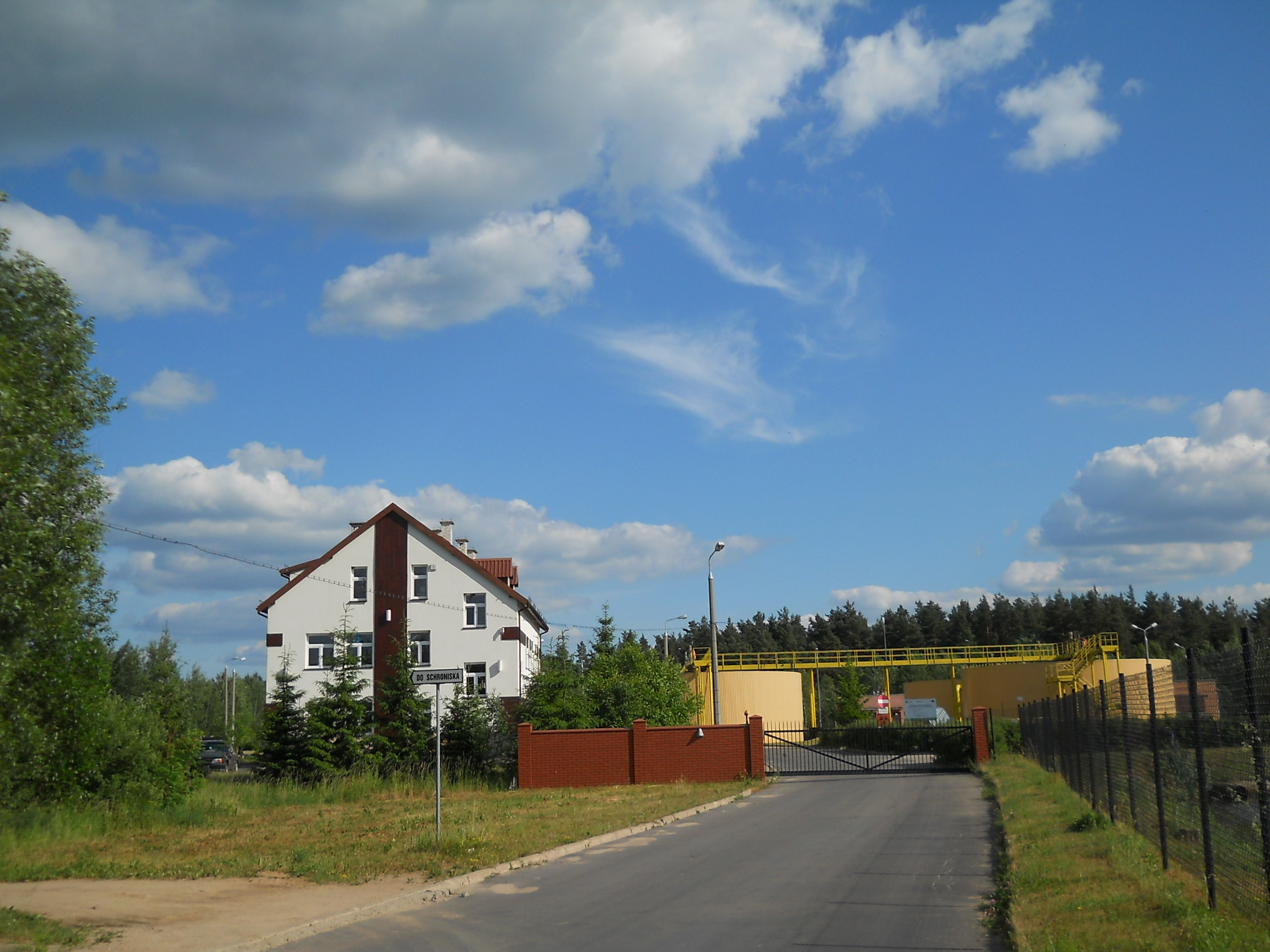 Przedsiębiorstwo wodociągów i kanalizacji. Oczyszczalnia ścieków.Ulica J.Słowackiego.